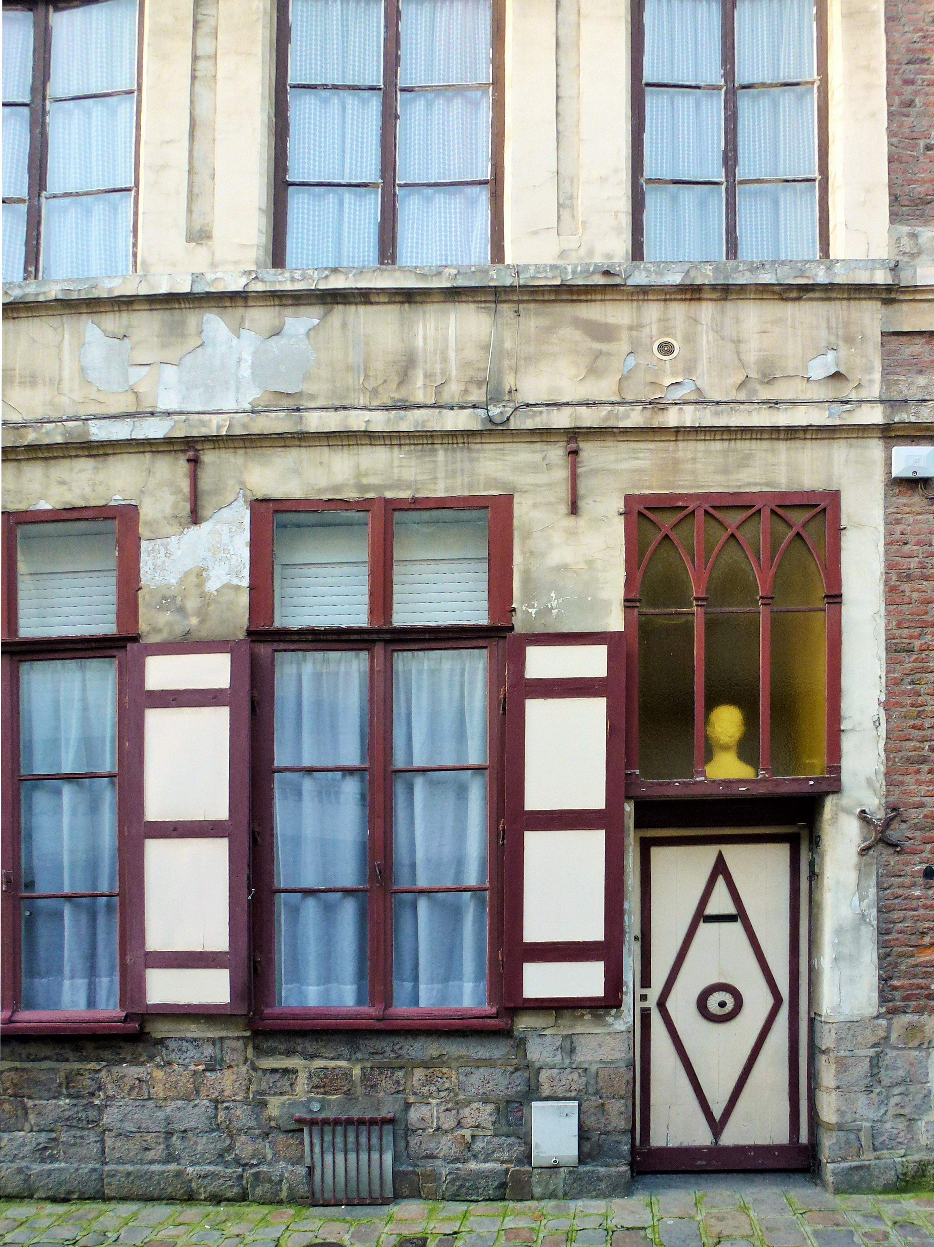 Lille 62, rue Saint-Étienne Nord (département français) .